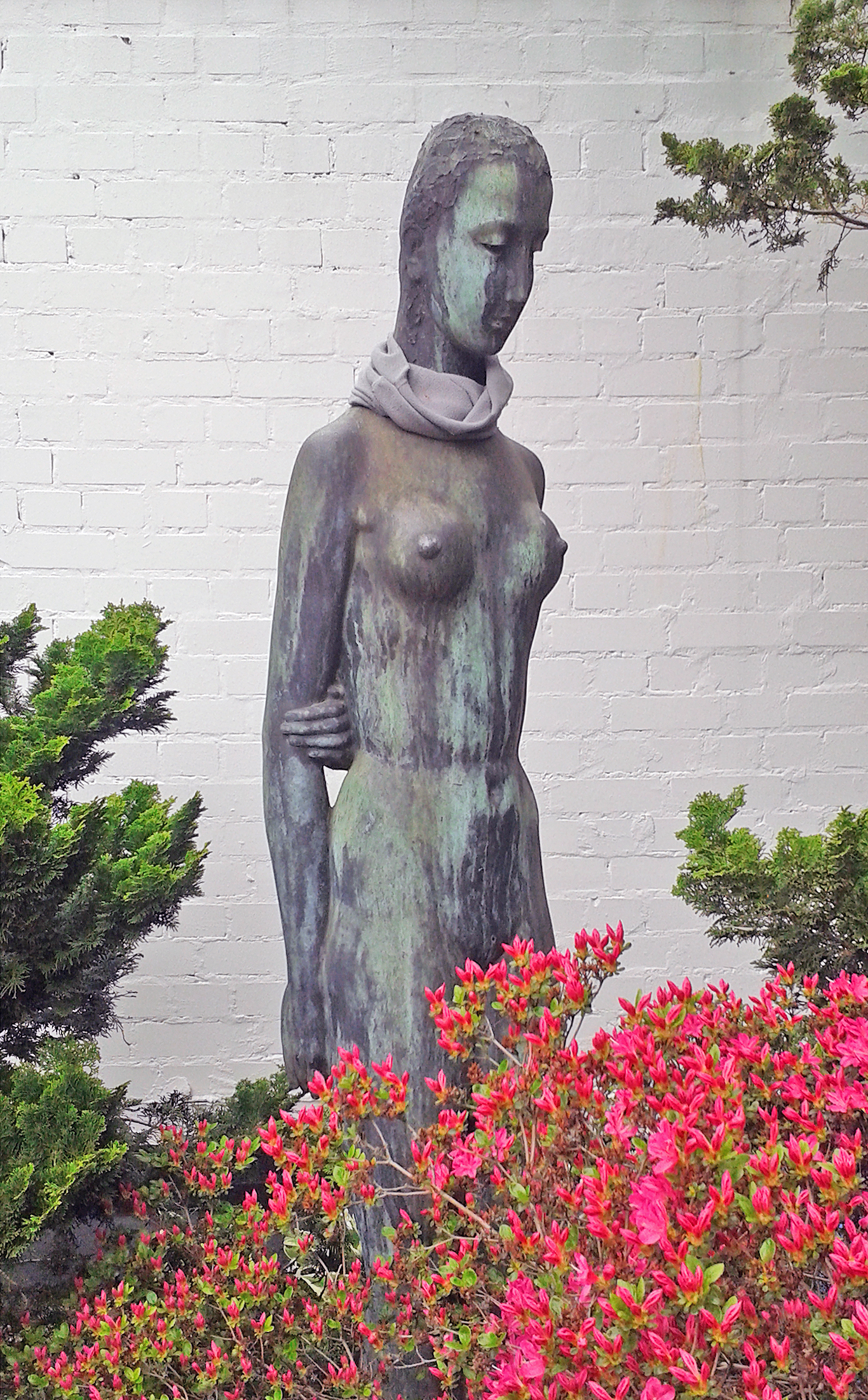 Friedrich Adolf Sötebier schuf die 200 cm hohe Bronzefigur "Sinnende" 1957 ohne Auftrag. Die "Sinnende" wurde später von der Stadt Hannover im Stadtpark von Hannover in Niedersachsen aufgestellt. Die Bronzefigur befindet sich dort an der linken Außenwand vom "Rosencafé". Die Zufahrt ist von der Clausewitzstraße aus zur Kleefelder Straße bis zum Schild Rosencafe.